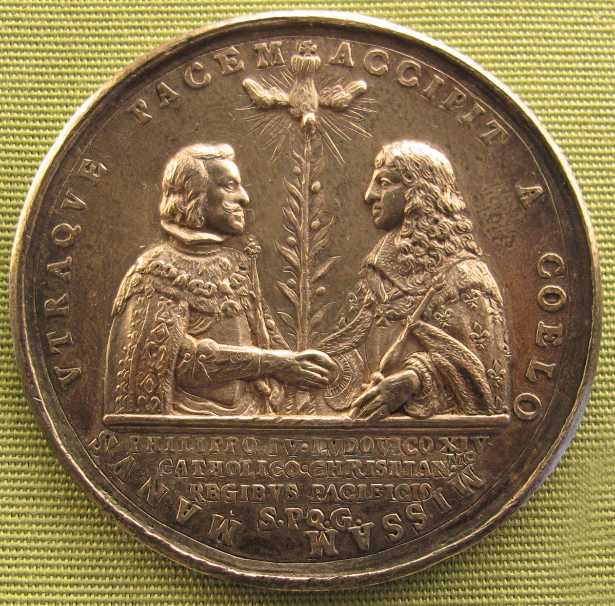 Luigi XIV e Filippo IV di Spagna, pace dei Pirenei, 1660